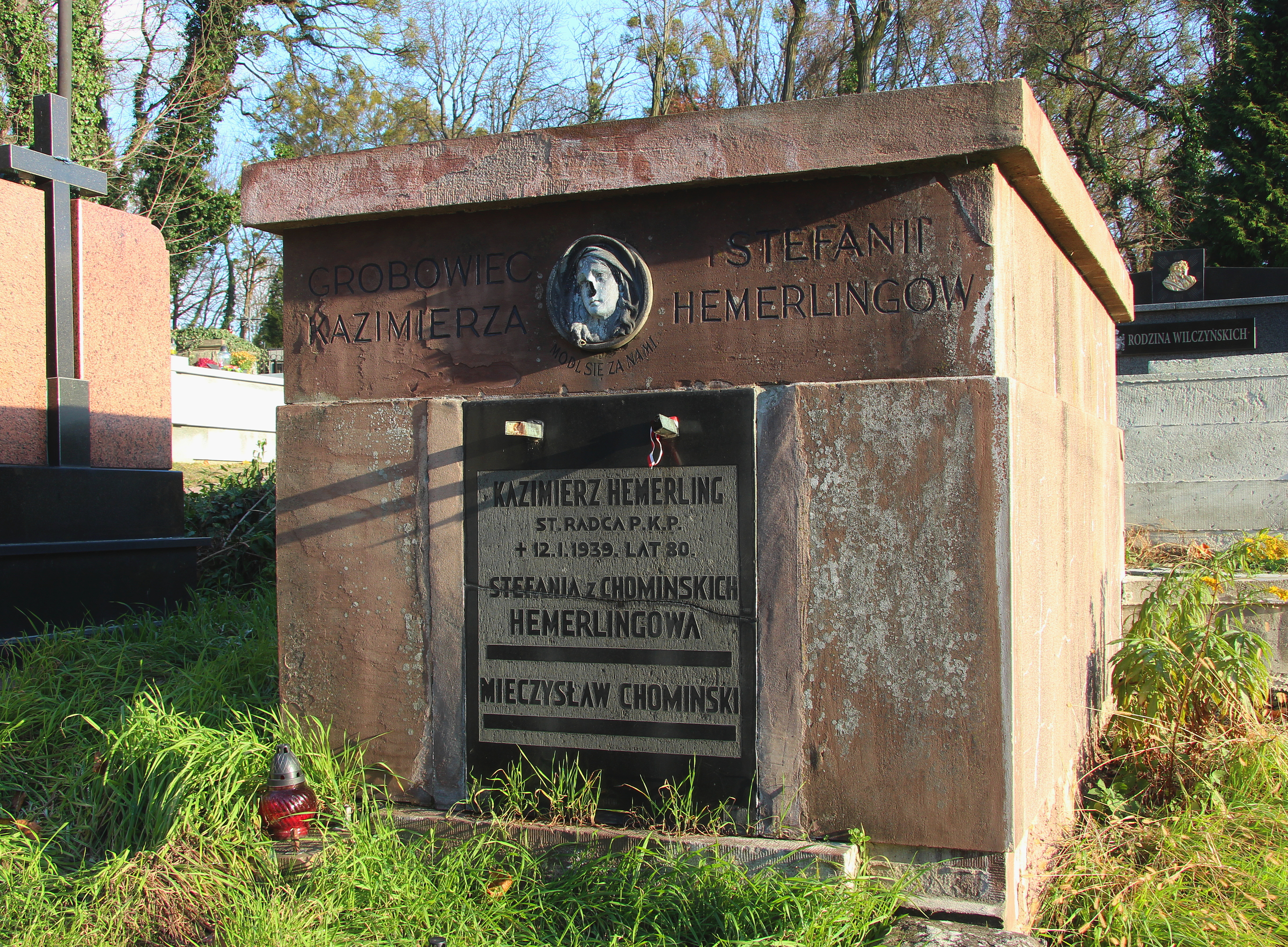 Гробівець родини Хемерлінгів.Личаківський цвинтар , поле № 49.